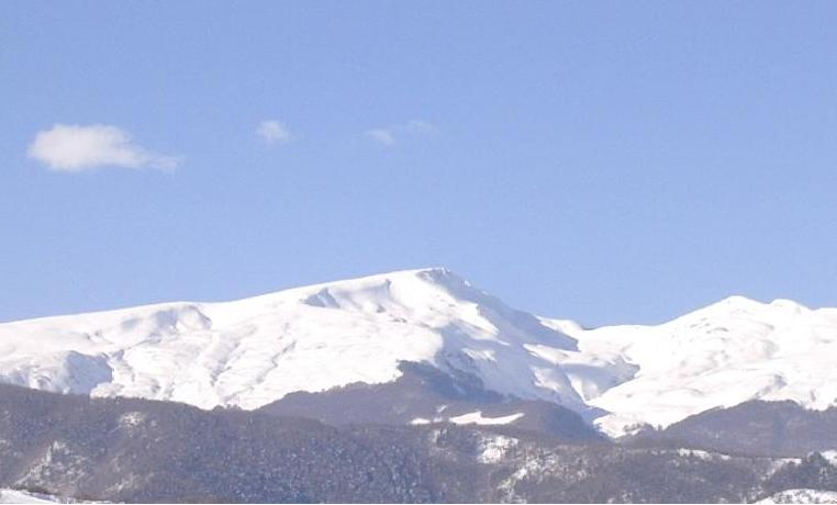 Veduta di Monte Gorzano da Pagliaroli